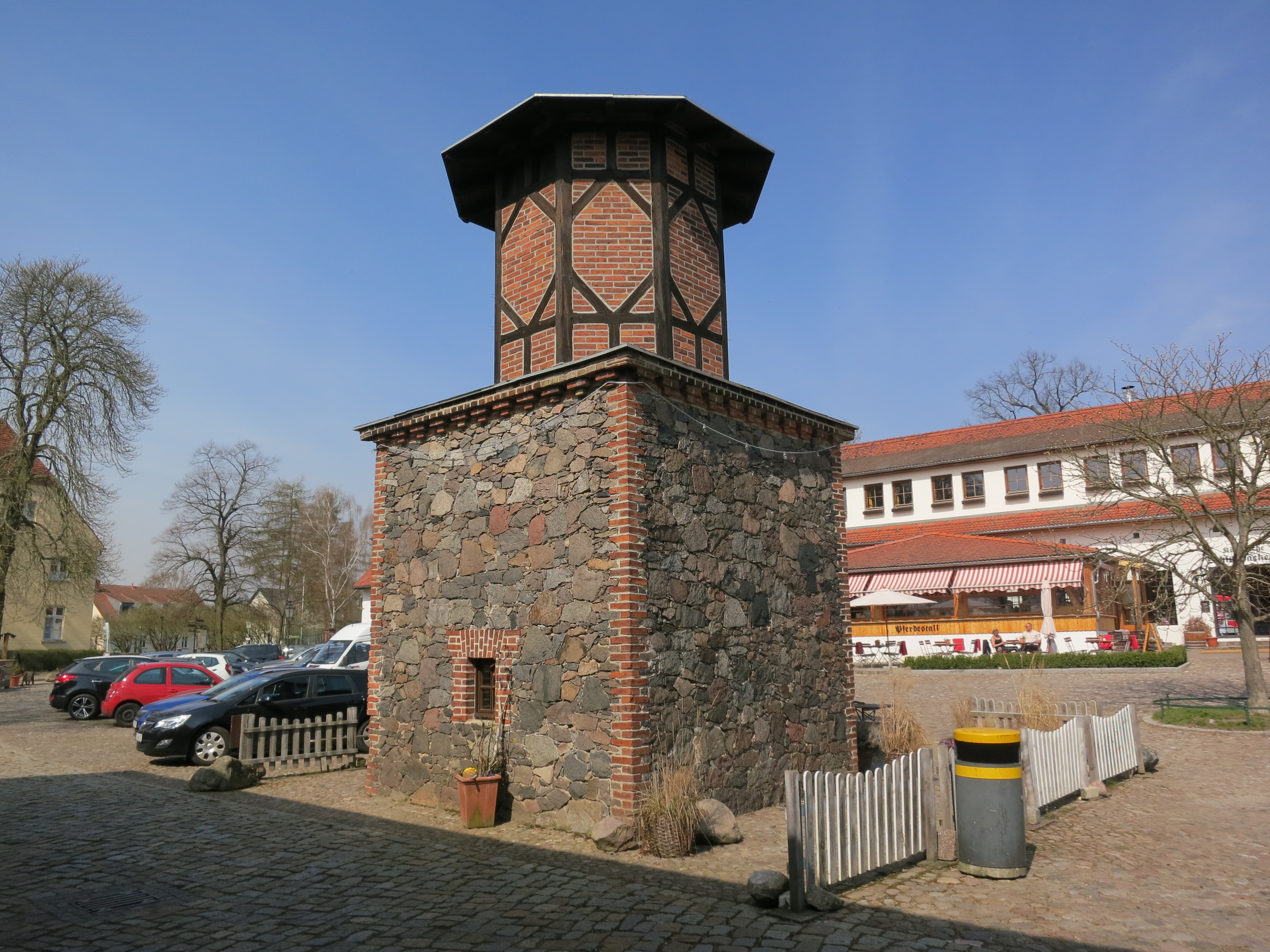 Gutshof Diedersdorf, Taubenhaus, denkmalgeschützt